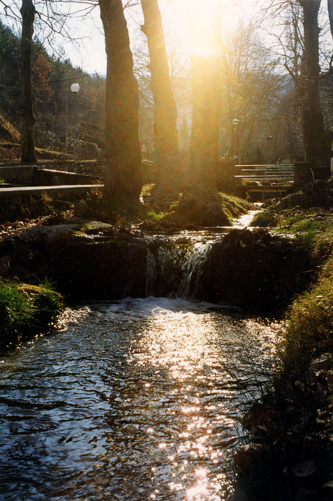 Fotografia del ruscello di Bagni di Nocera (1999)